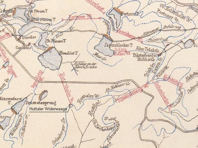 Lage der Huttaler Widerwaage und der wichtigsten damit verbundenen Anlagen